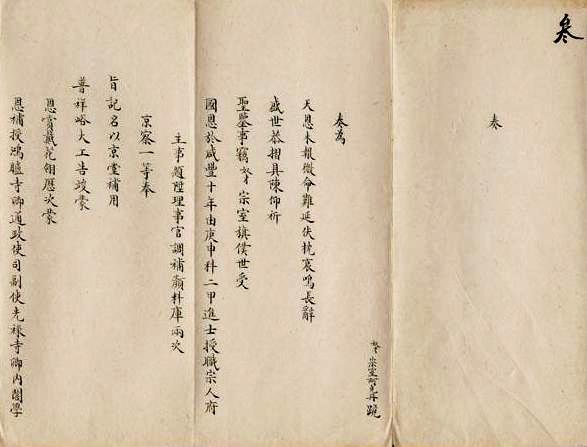 理藩院尚書宗室阿克丹奏報病危叩謝天恩摺